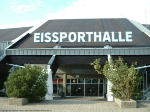 Foto der Eissporthalle Ratingen